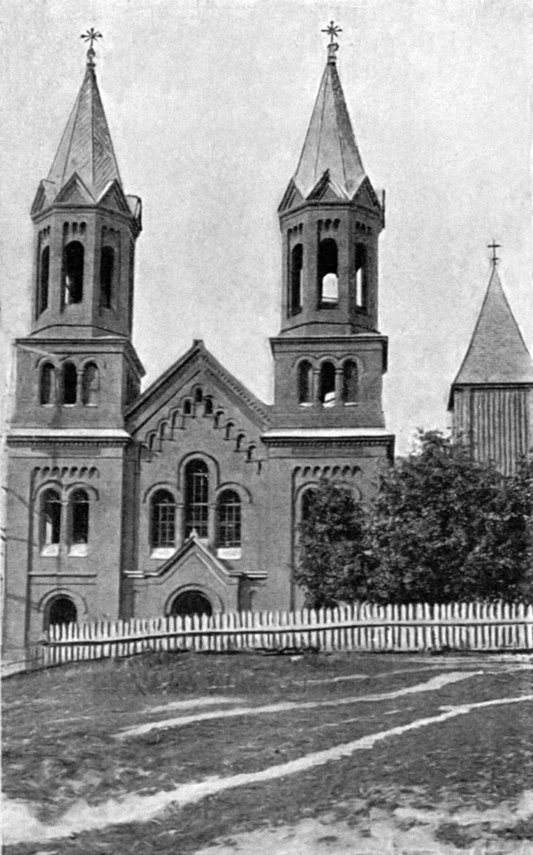 Беларуская (тарашкевіца): Росіца (Rosica). Новы касьцёл